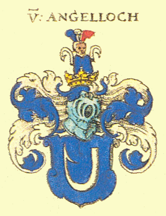 Wappen der Schwäbischen Adelsfamilie Angelach